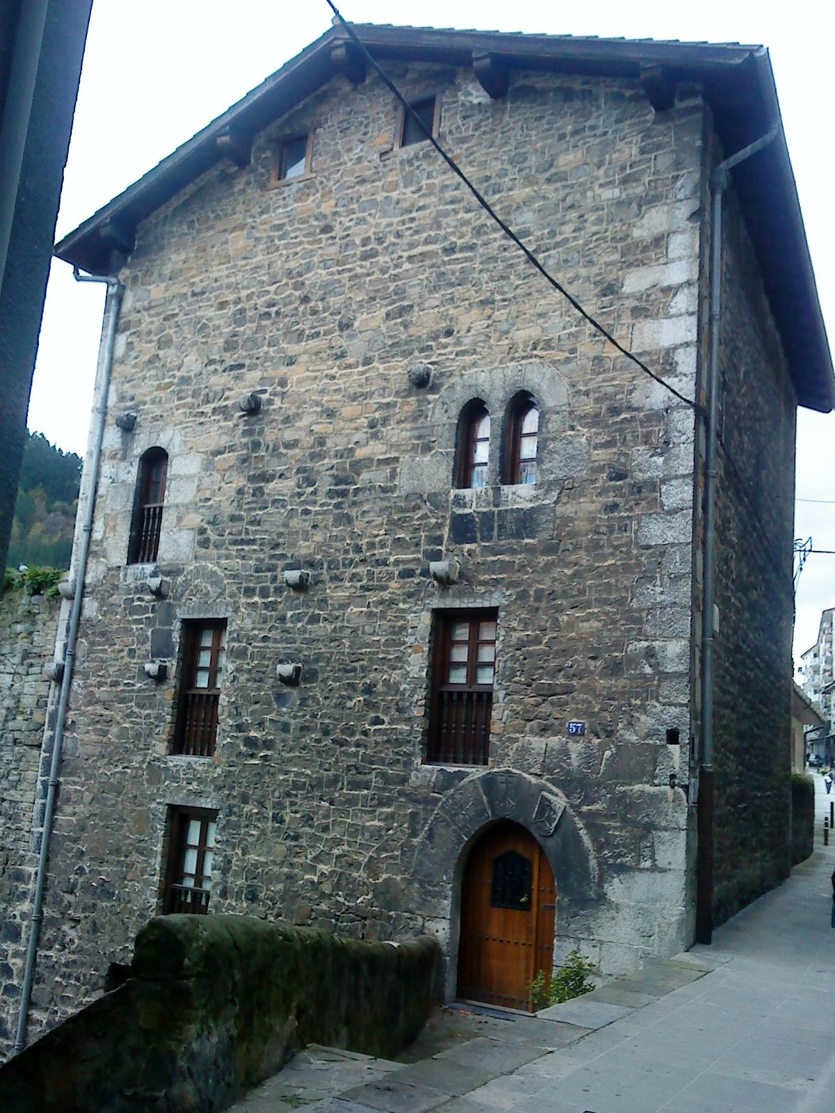 Casa torre Likona de la localidad vizcaína de Ondárroa.